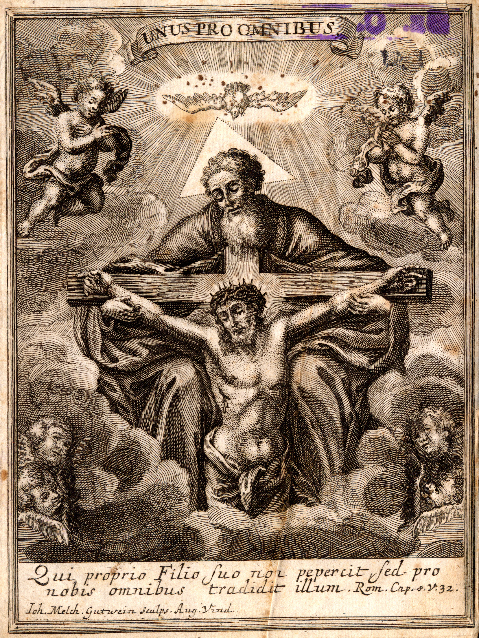 Frontispiz aus u.g. Werk. Abgebildet ist das Biberbacher Gnadenbild (Kruzifix), von Gottvater mit den Händen erhoben, darüber der Heilige Geist in Gestalt einer Taube, die Dreifaltigkeit symbolisierend. Ringsum anbetende Engel. Die Beschriftungen lauten: 'UNUS PRO OMNIBUS.' - 'Einer für alle.' 'Qui proprio Filio suo non pepercit, sed pro nobis omnibus tradidit illum. Rom. Cap. 8. V. 32.' - 'Der seinen eigenen Sohn nicht geschont, sondern jenen für uns hingegeben hat. Röm. Kap. 8, Vers 32' 'Ioh. Melch. Gutwein sculps. Aug. Vind.' - 'Iohann Melchior Gutwein hat es zu Augsburg graviert.'